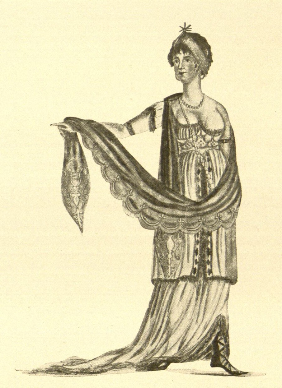 Elise Bürger als Cleopatra in Kotzebues Oktavia.